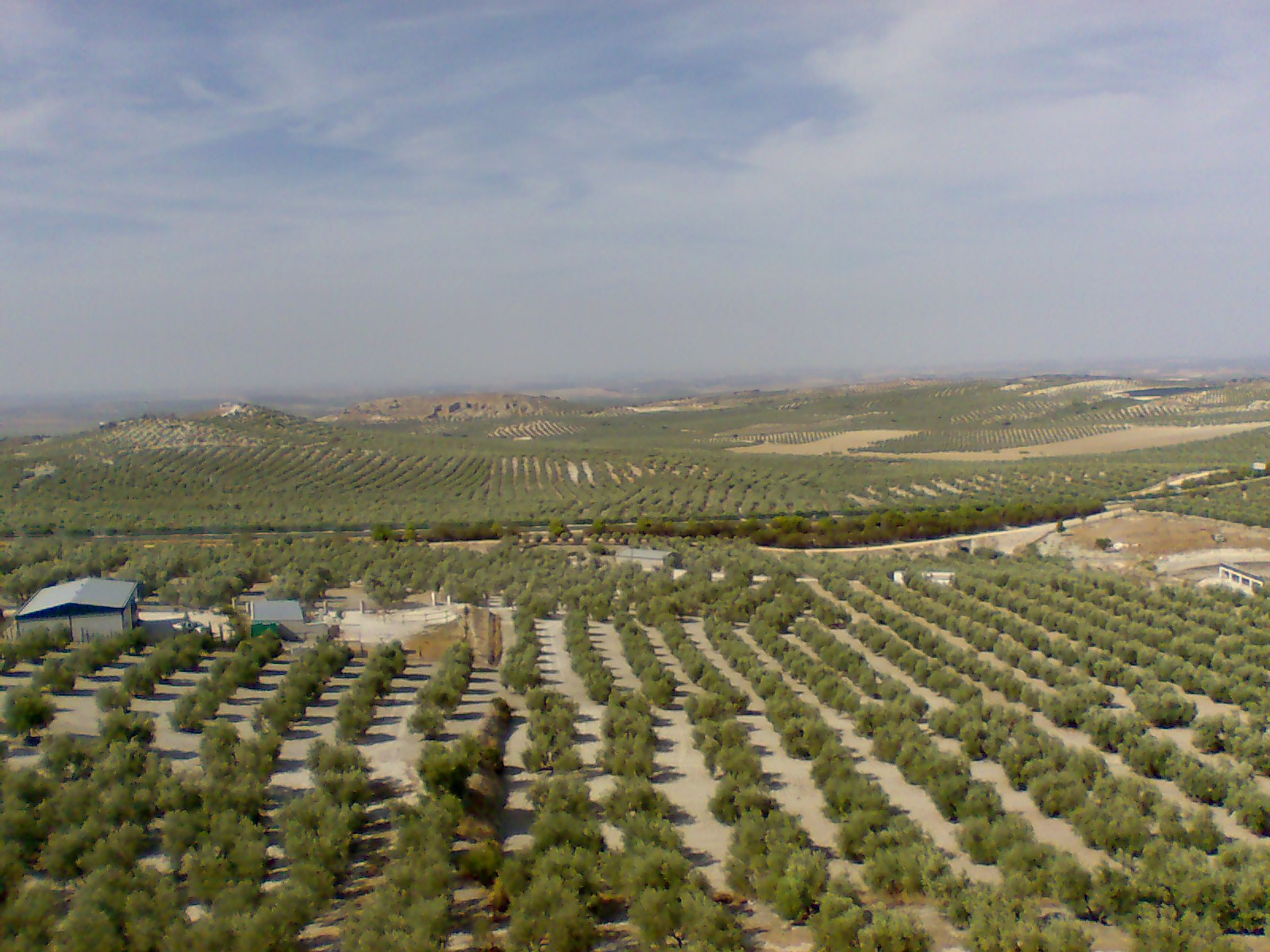 Olivares de la Campiña Estepeña, Estepa (Sevilla, España)